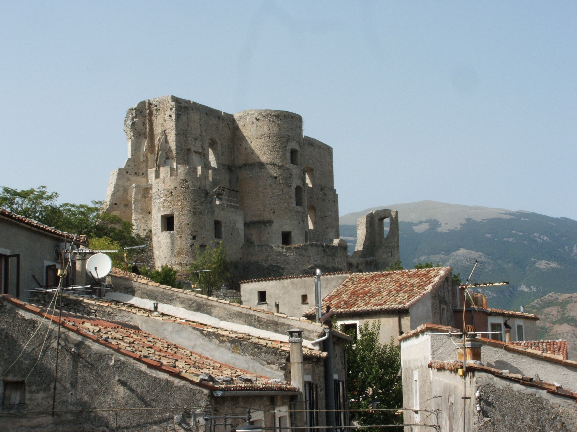 Castello Normanno-Svevo; Morano Calabro (Cosenza)